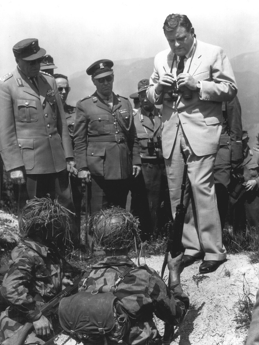 Soldiers briefing Dr. Franz-Josef Strauss (Federal Minister of Defense) during field exercise, W.-Germany, 1960